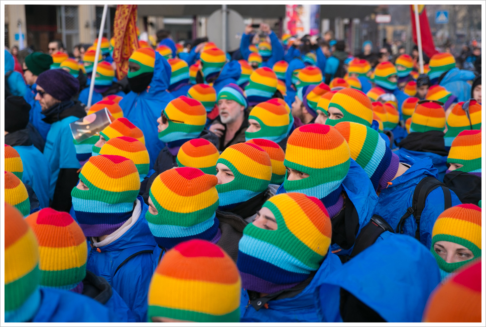 Blockupy-Proteste in Frankfurt am Main